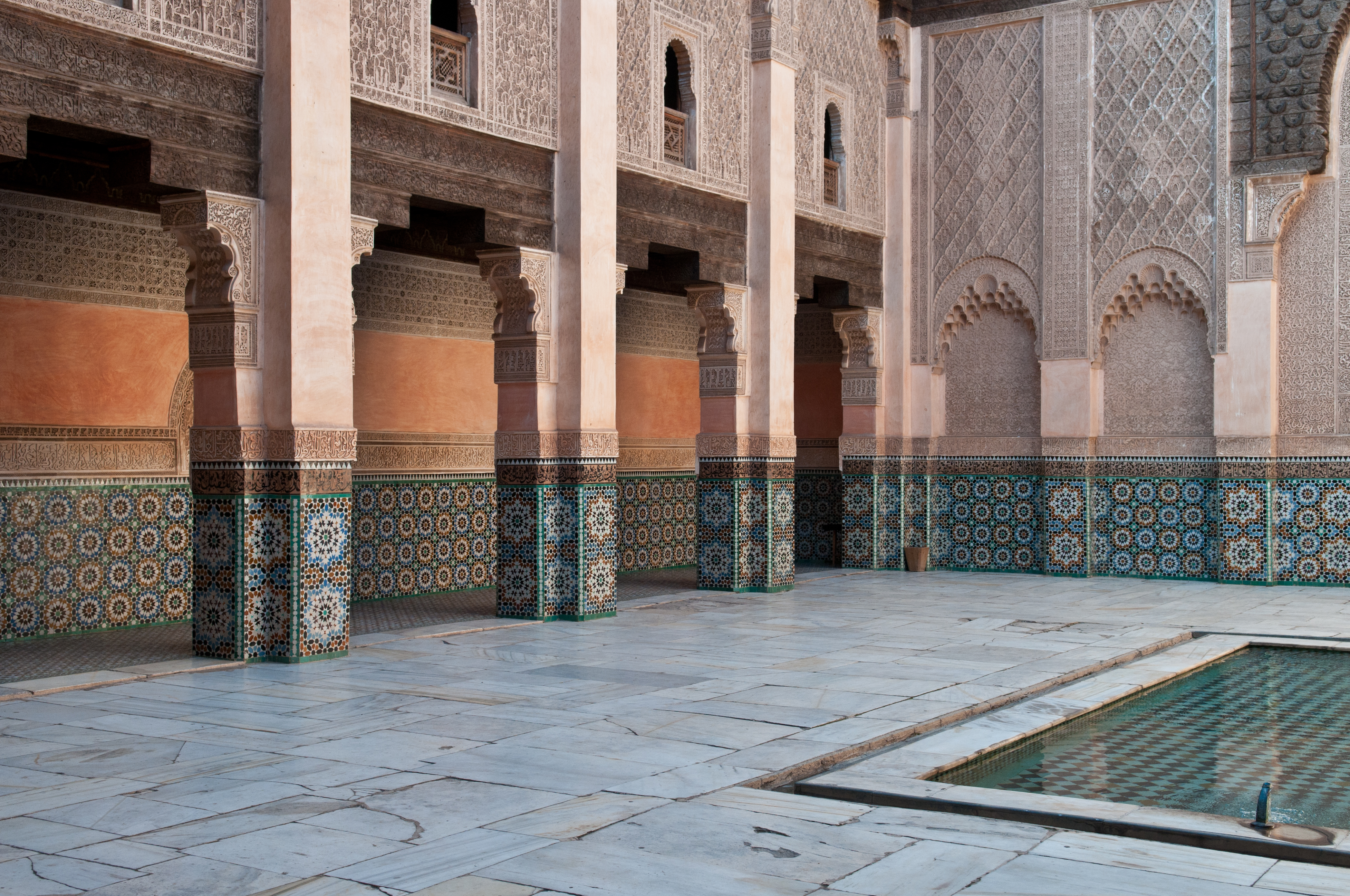 Marrakesh, Ben Youssef Medersa